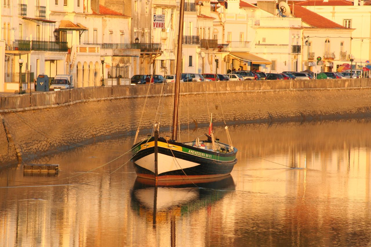 Rio Sado in Alcacer do Sal